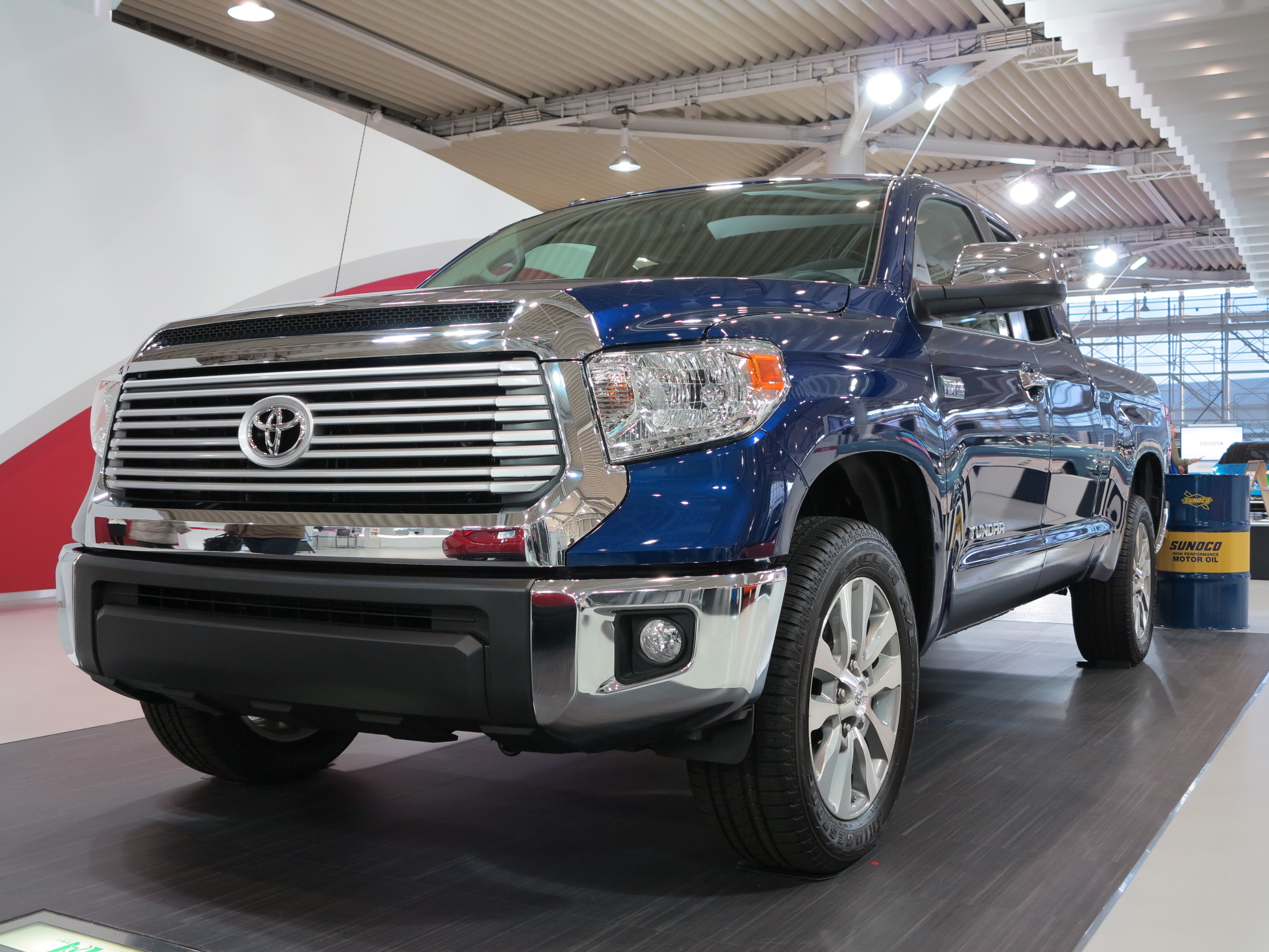 東京・台場のMEGAWEBにて展示されていたトヨタ・タンドラ